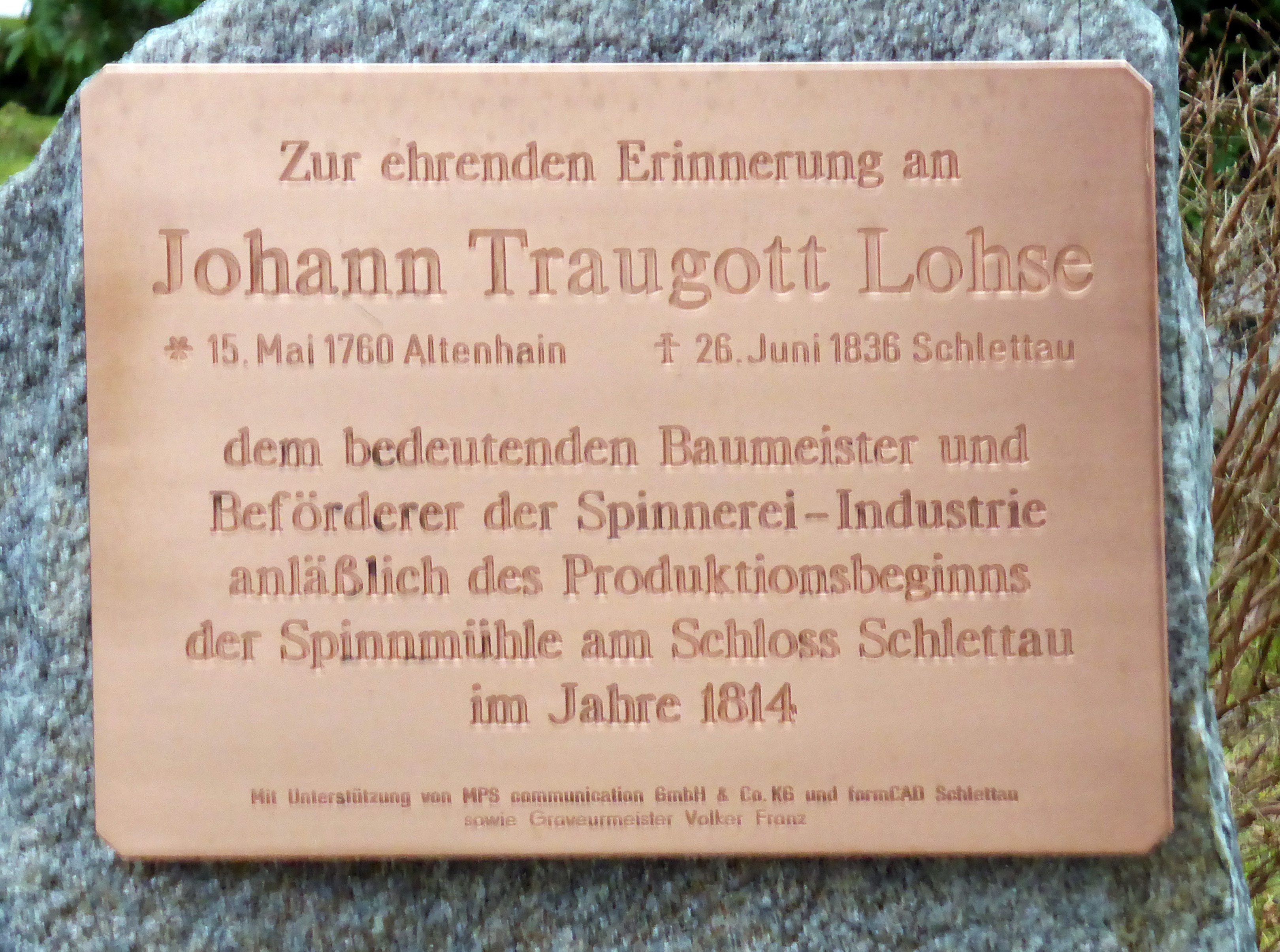 Gedenkstein von Johann Traugott Lohse, Schloss Schlettau - Schlettau, Erzgebirgskreis - Sachsen.